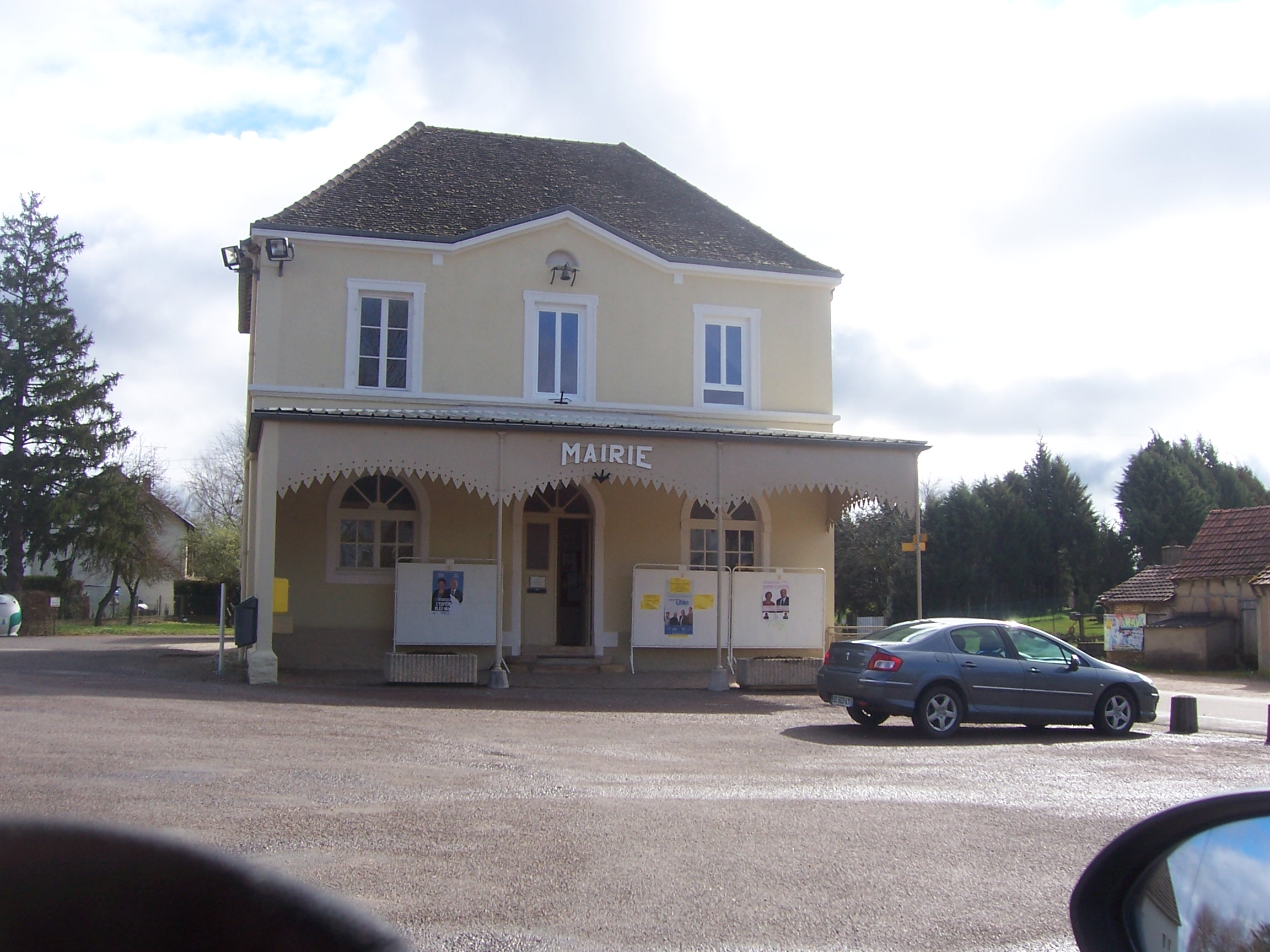 Mairie de l'Abergement-Sainte-Colombe